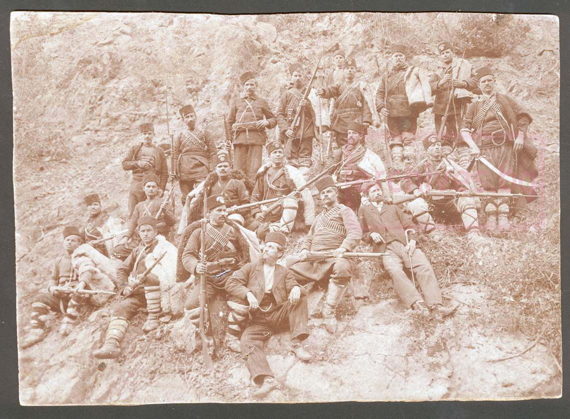 Четата на Стамат Неделчев.